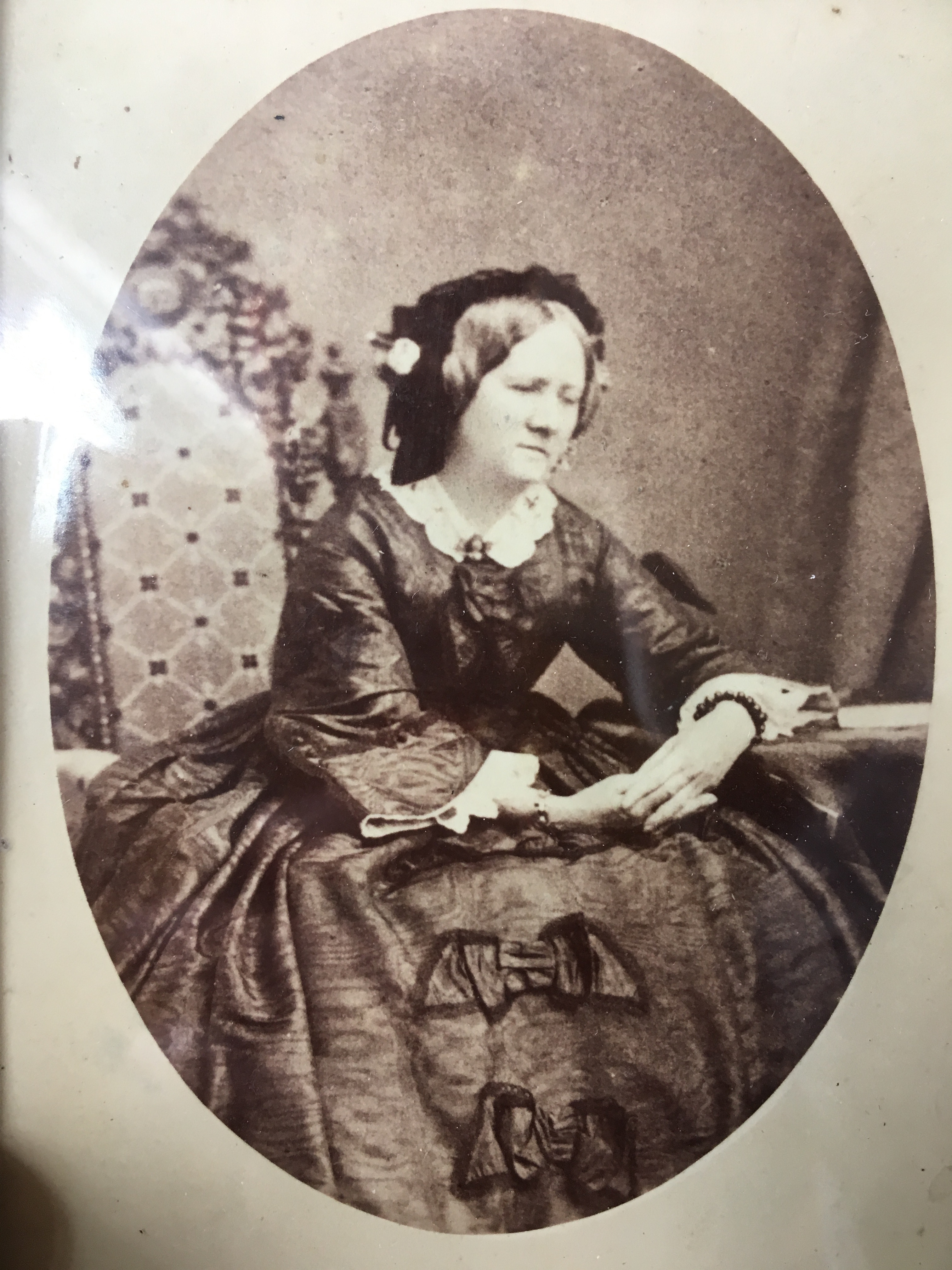 Fille du général Victor Léopold Berthier, petite fille de Jean-Baptiste Berthier